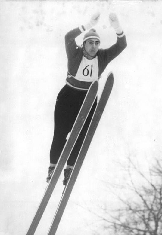 Zentralbild Wlocka 20.2.1957 VIII. Wintersportmeisterschaften in Brotterode Am Dienstag, dem 19.2.1957, wurden die Staffelläufe der Damen und Herren ausgetragen. Bei den Damen siegte die Staffel vom SC Motor Zella-Mehlis und bei den Herren konnte der Ask Vorwärts Oberhof seiner Favoritenrolle gerecht werden. UBz: Sieger in der Nordischen Kombination wurde Siegfried Böhme (SC Dynamo Klingenthal). Siegfried Böhme beim Springen.